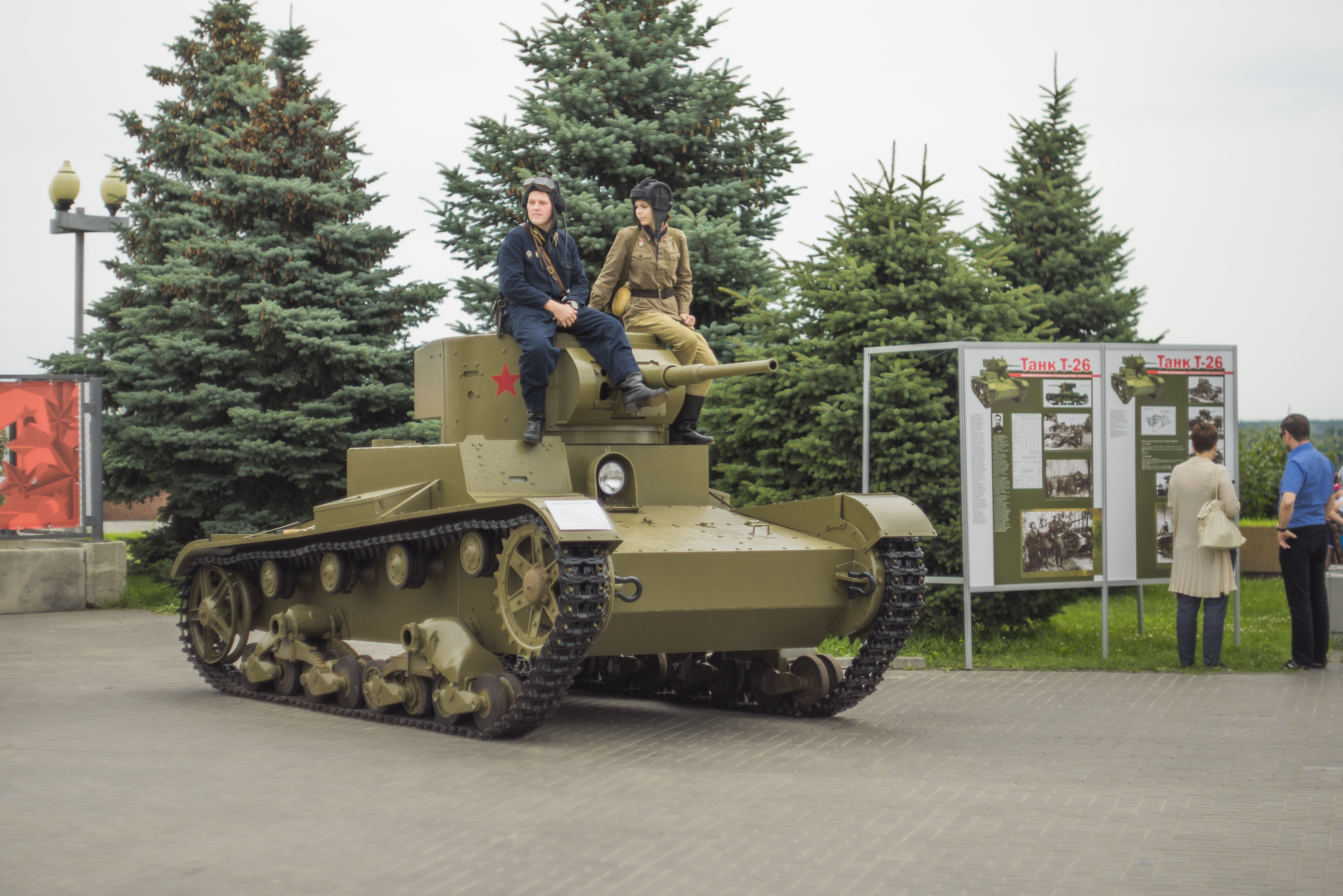 Танк в Т-26 в комплексе музея-заповедника «Сталинградская битва»